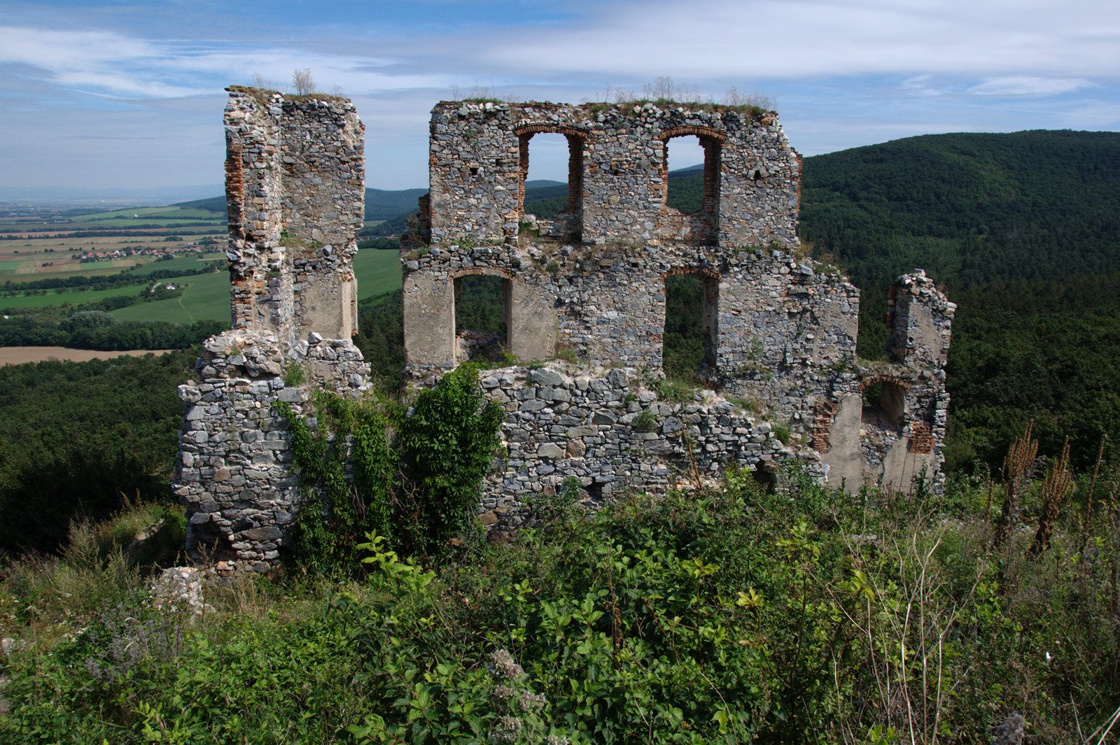 zrúcanina Hradu Oponice